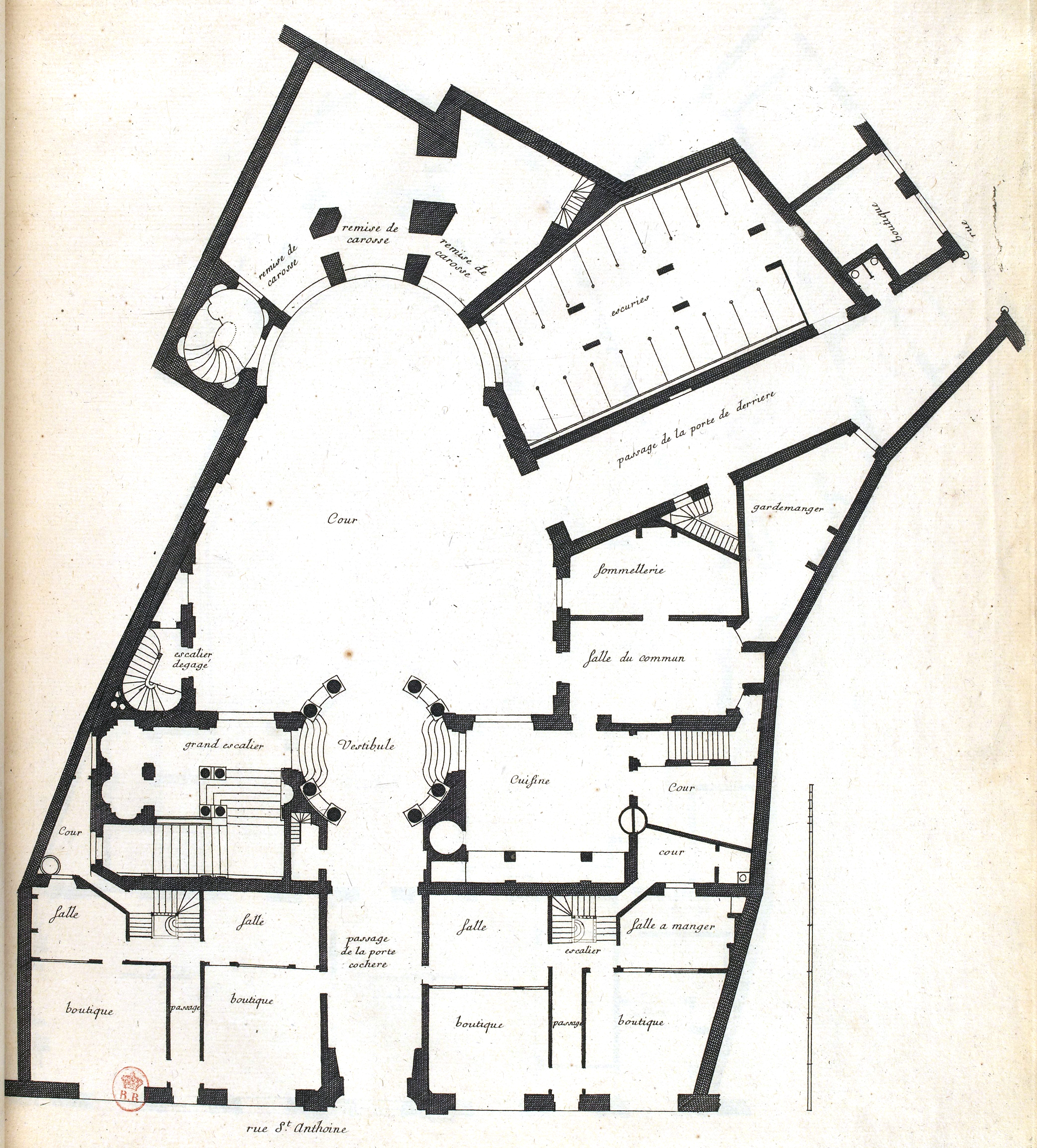 Plate from Jean Marot's L'Architecture française